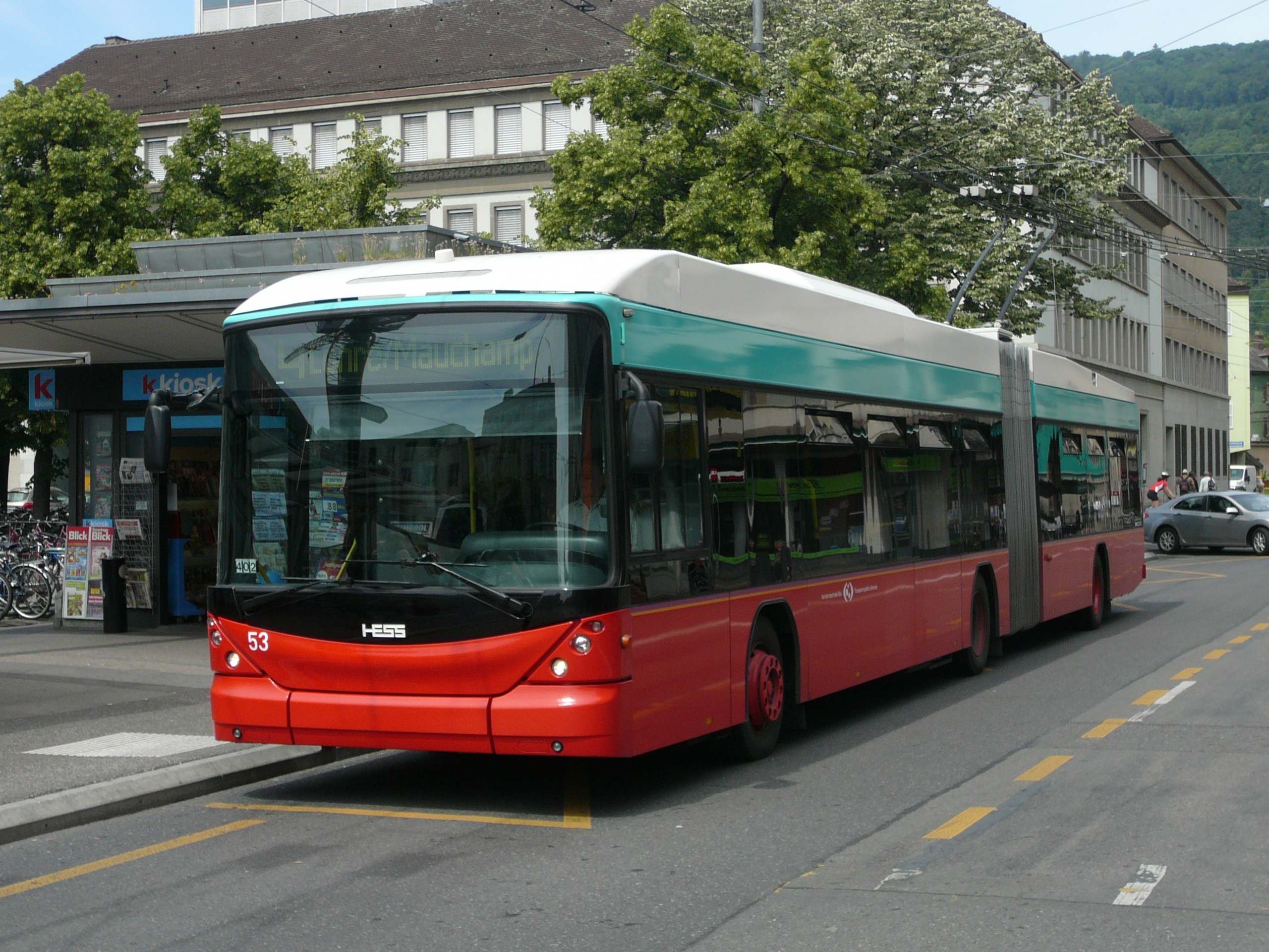 Trolleybus der Verkehrsbetriebe Biel (VB)